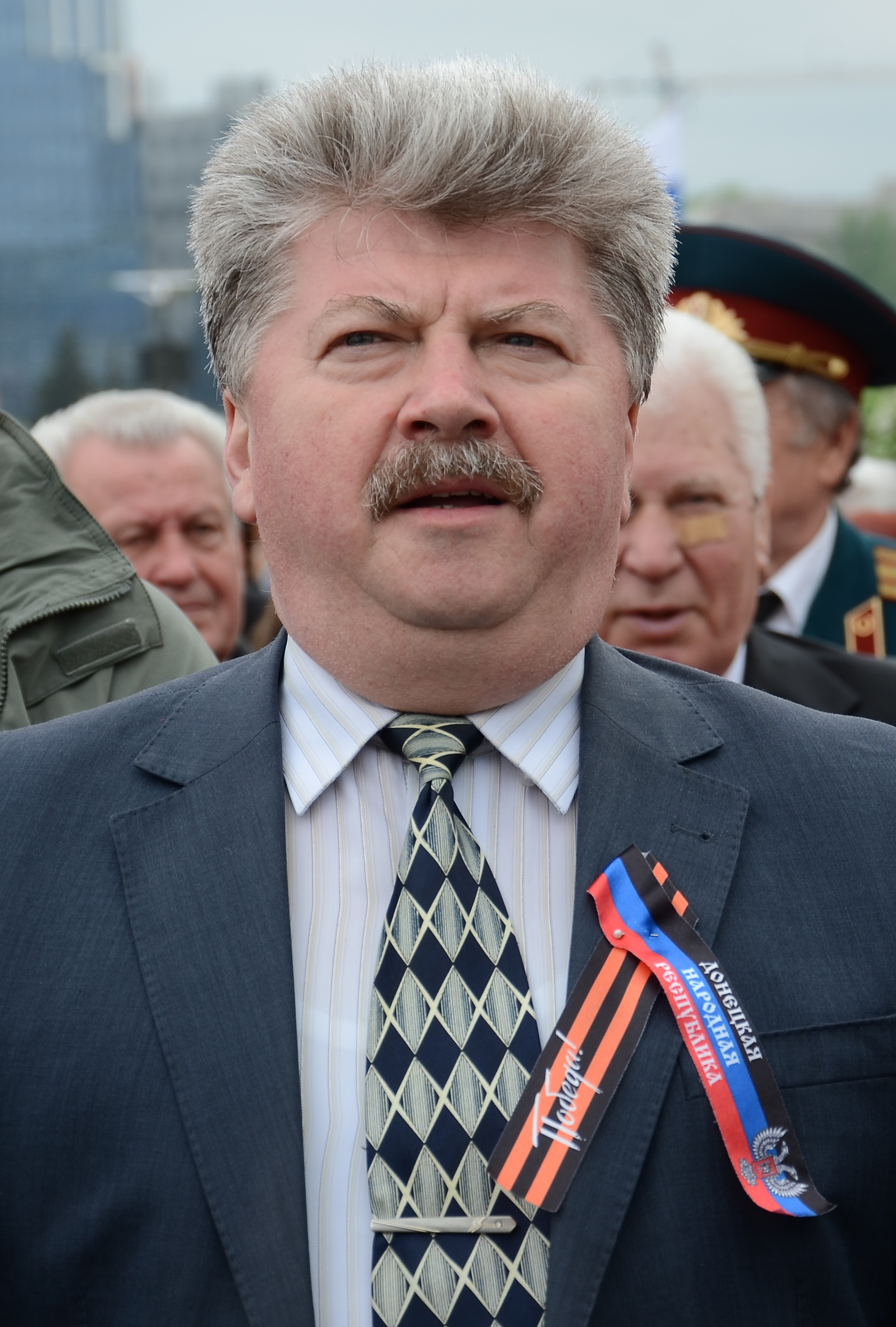 День Победы в Донецке